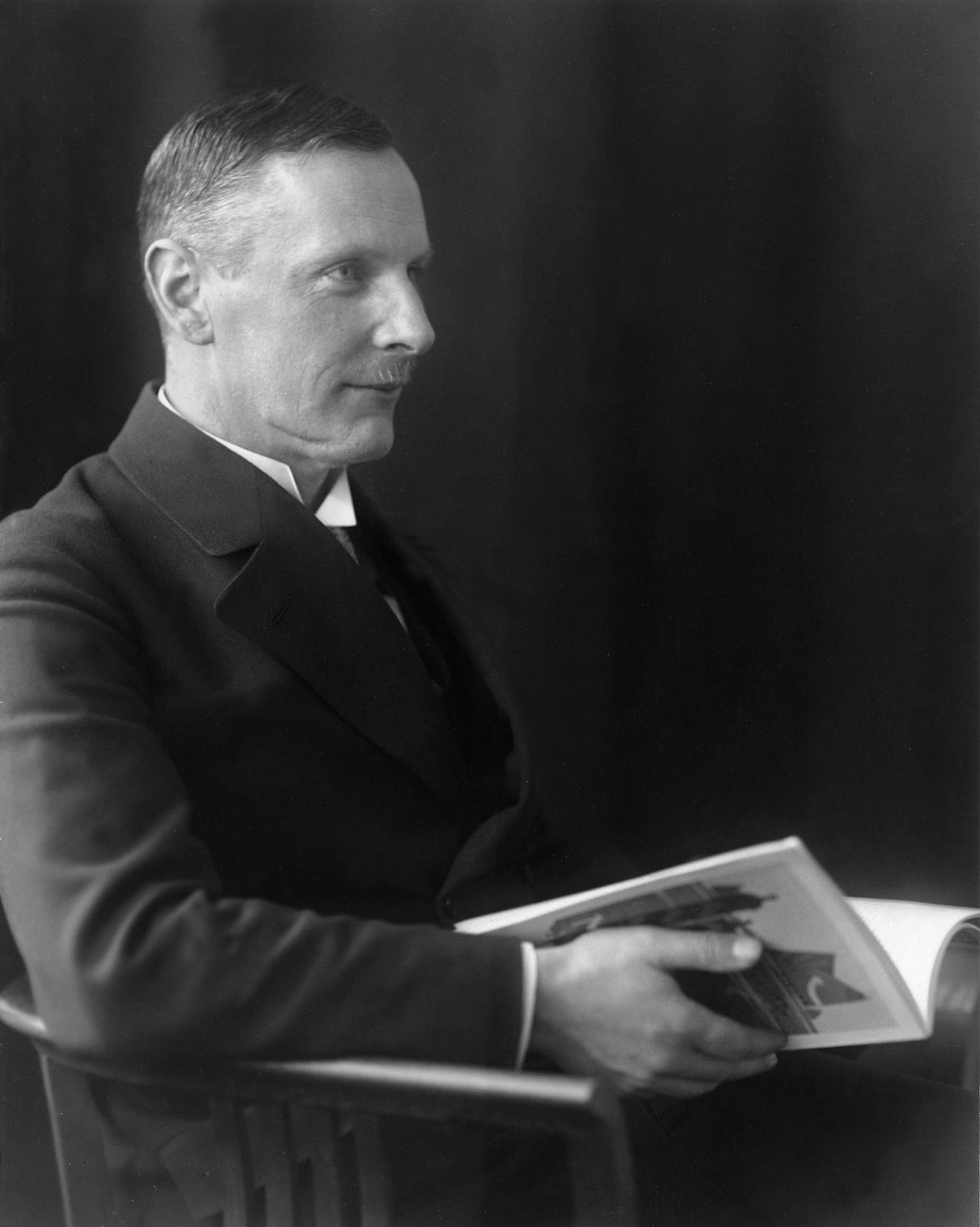 Porträt Walther Pauer